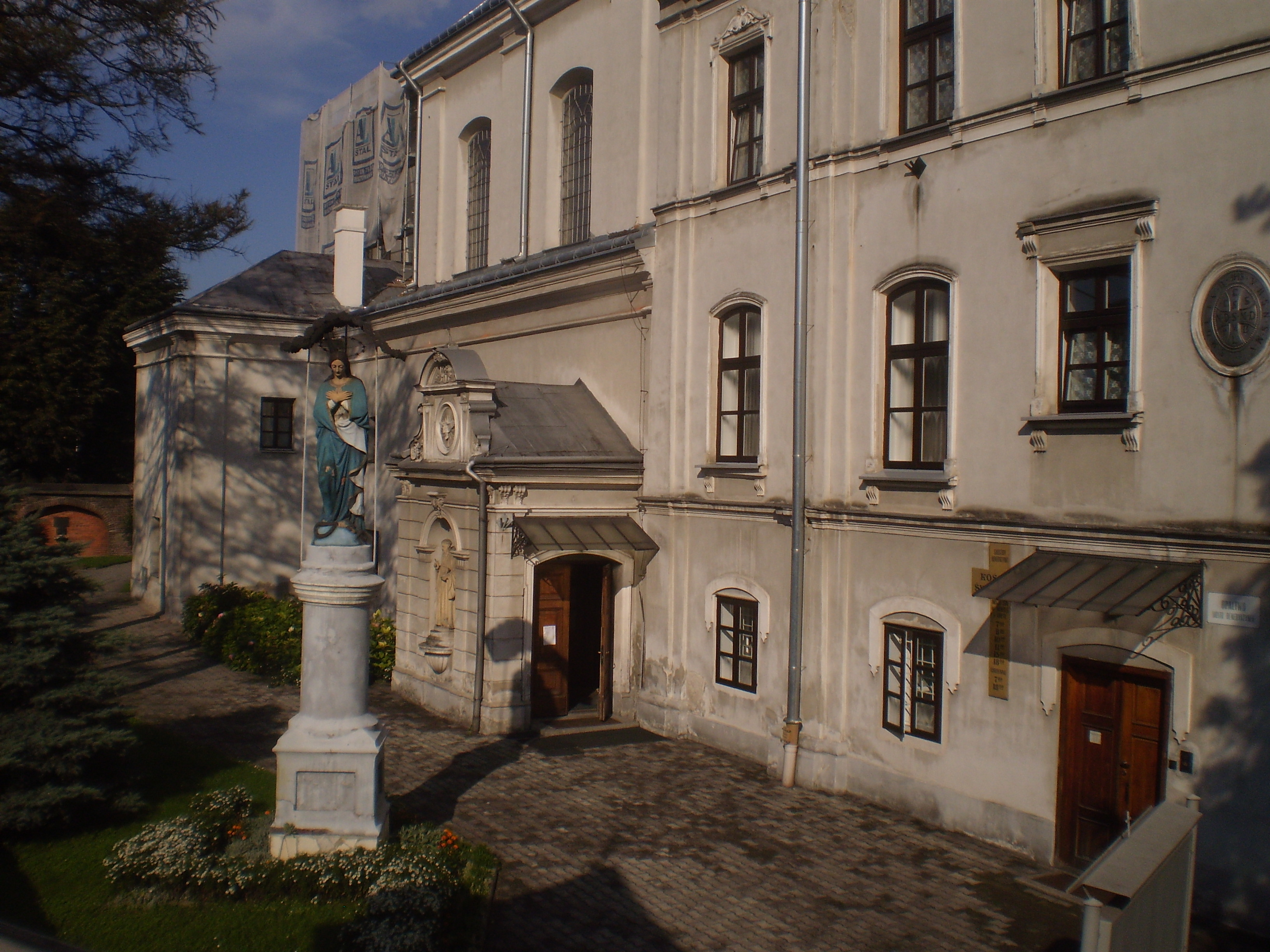 Przemyśl, kościół p.w. Świętej Trójcy w zespole klasztornym benedyktynek "Na Zasaniu" (zabytek nr rejestr. A-255)